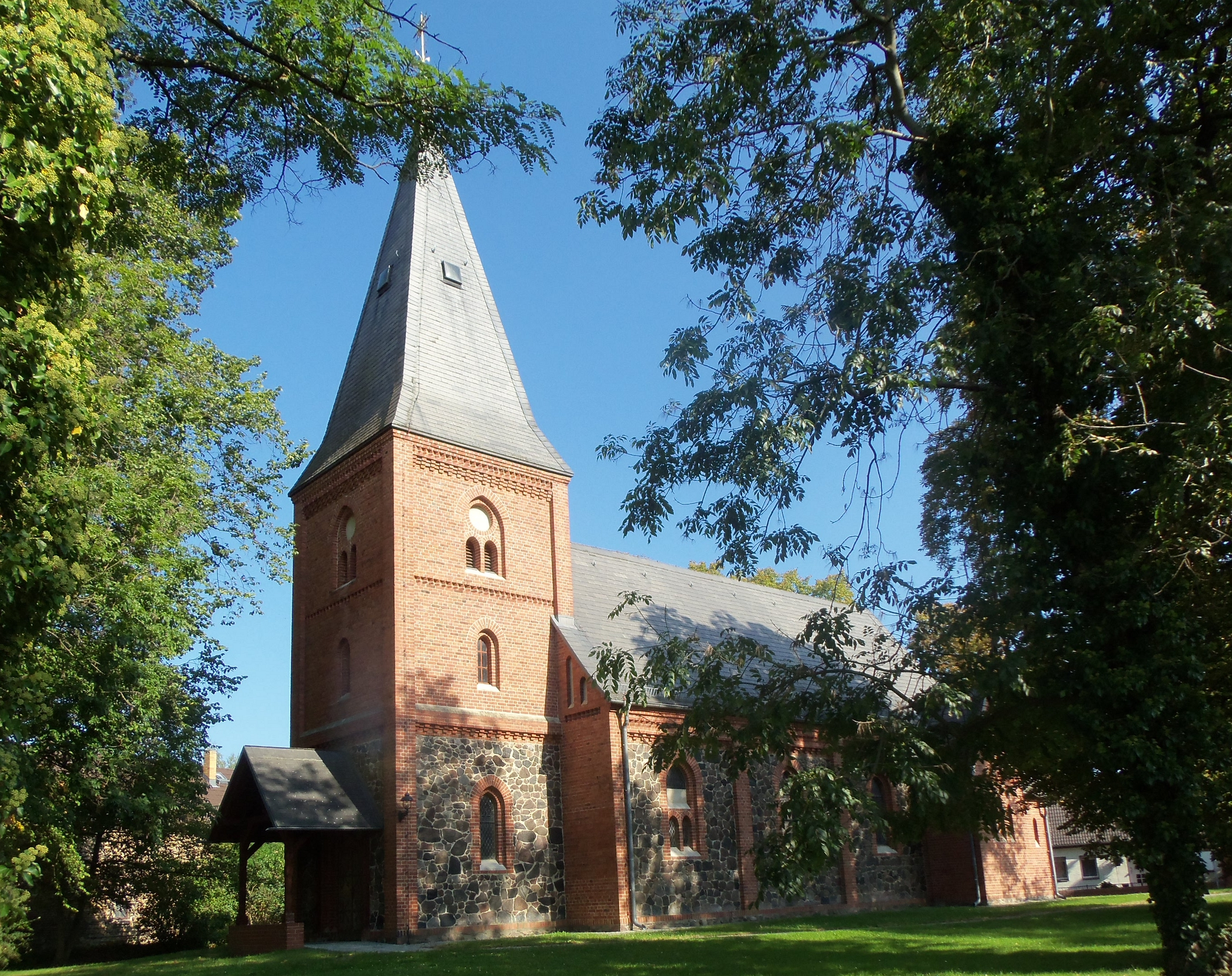 Potsdam, Dorfkirche Kartzow. Standort: an der Dorfstraße. Von dem hinter ihr gelegenen Wiesengelände aus fotografiert. Einigermaßen erkennbar ist die sehenswerte Wand des Hauptschiffes aus Feldsteinen.